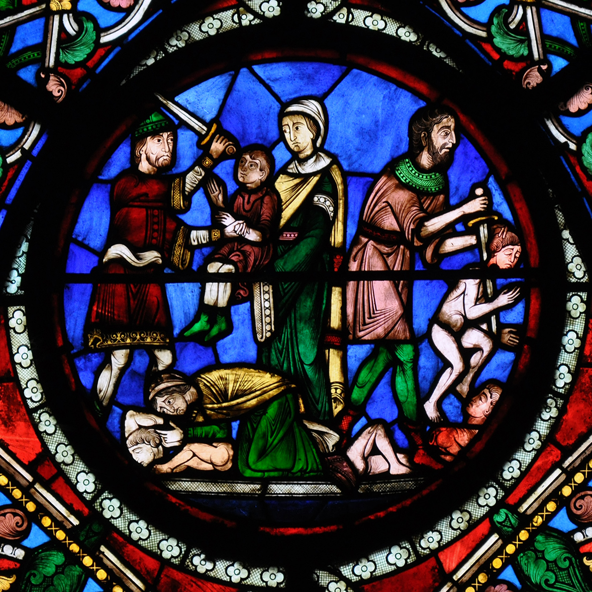 Vitrail de la Basilique Saint-Denis (chapelle Saint Maurice).Créé au 19ème siècle par Eugène Viollet-Le-Duc et Alfred Gérente: le massacre des Innocents.